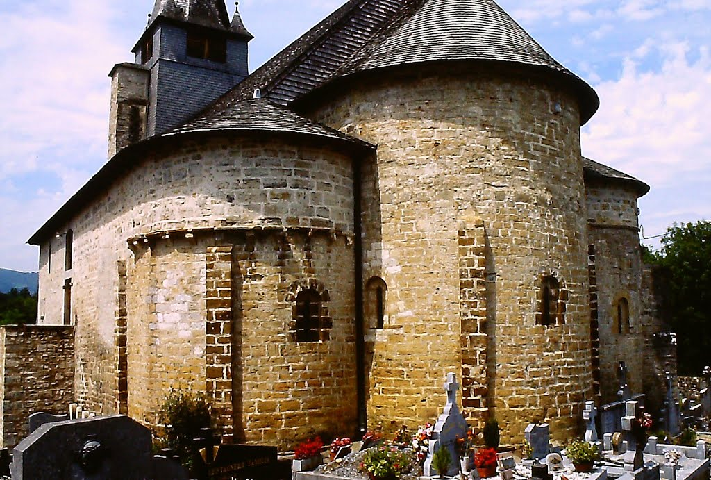 Ordiarp - Eglise Saint-Michel